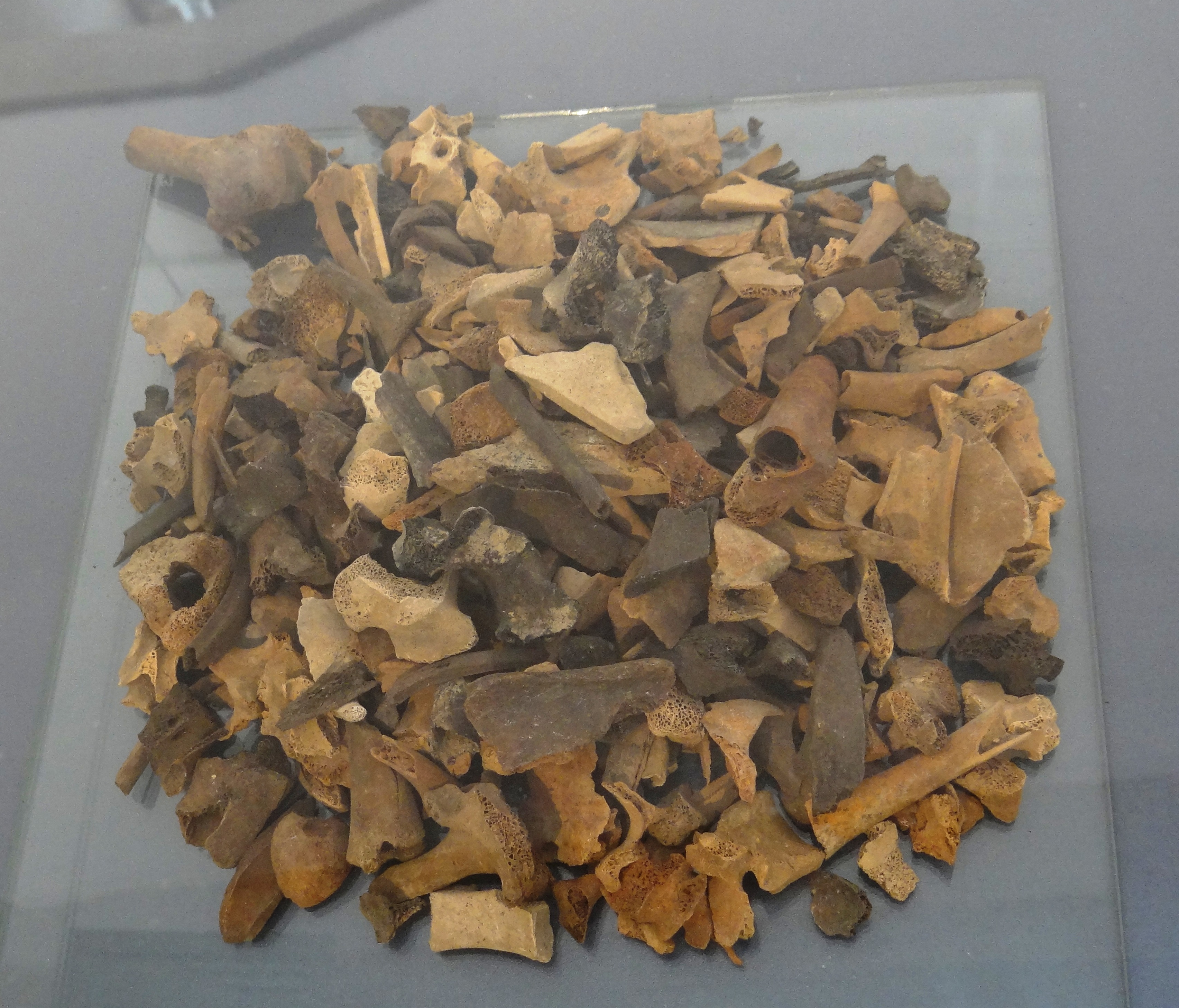 אוסף של עצמות של עז וכבש שנמצאו מתחת לארון הקודש. מרבית העצמות היו שרופות. החופרים לא הצליחו לקבוע האם העצמות נשרפו יחד עם בית הכנסת, או שנשרפו לפני כן. הועלתה השערה שהעצמות הן שריד למזבח קדום יותר מתקופת בית שני, כמה מאות שנים לפני כן. הצג בתערוכה "חכמת העצמות העתיקות" במוזיאון הכט